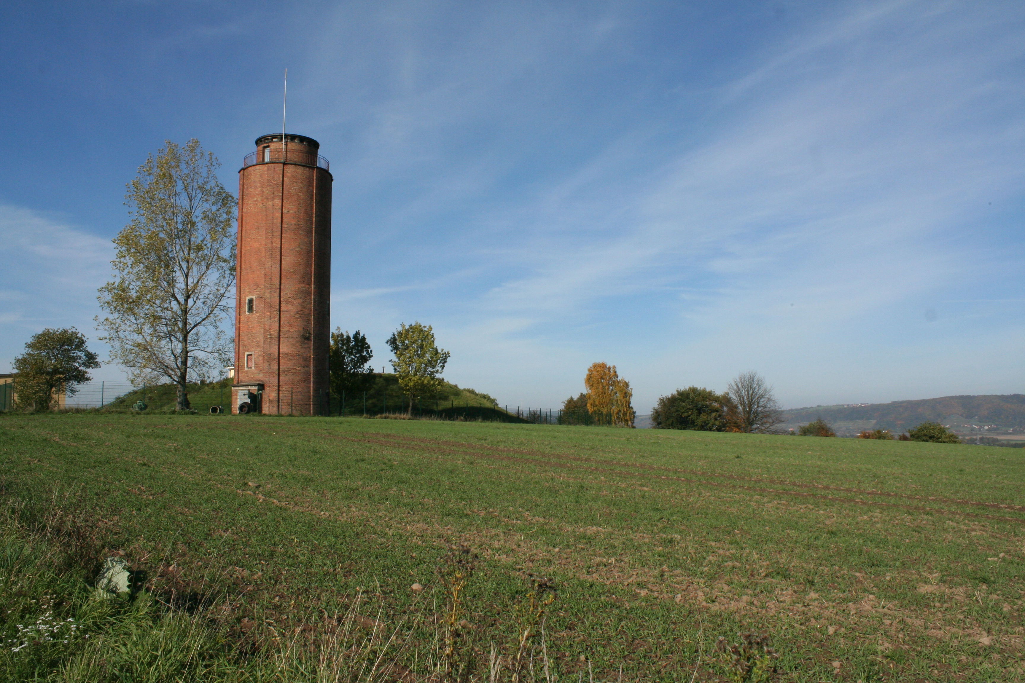 Heidenau, ehemaliger Wasserturm, Technisches Denkmal